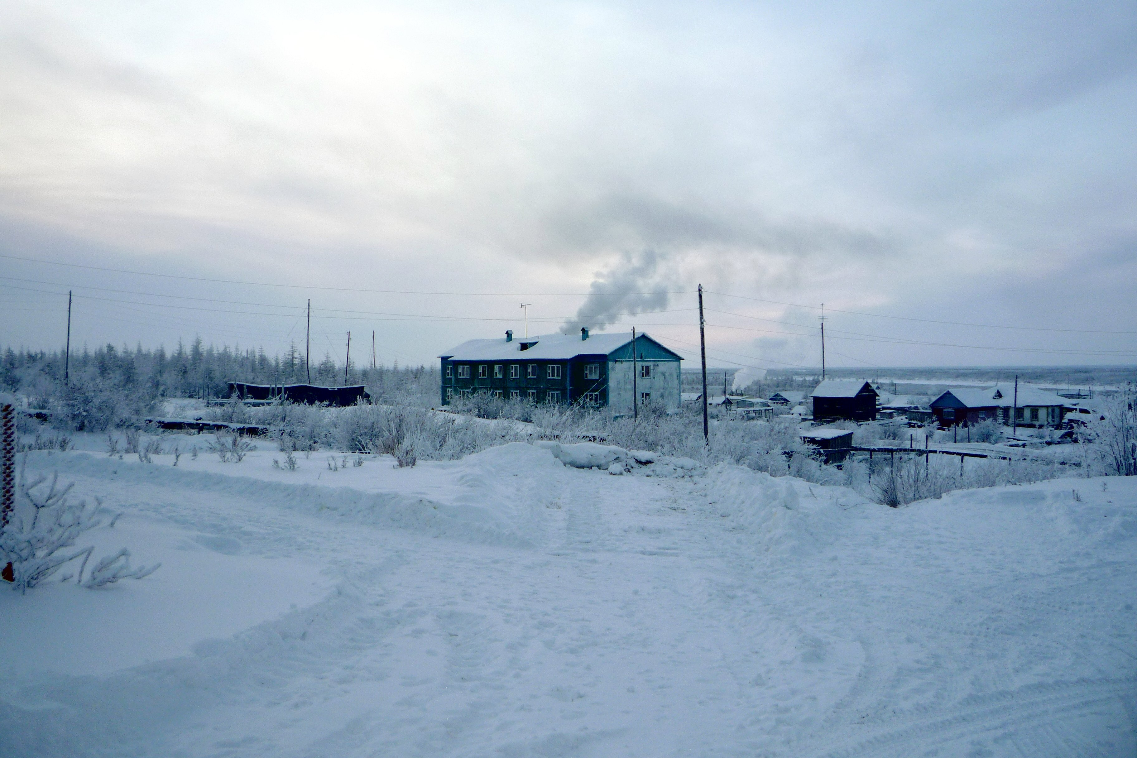 Анюйск